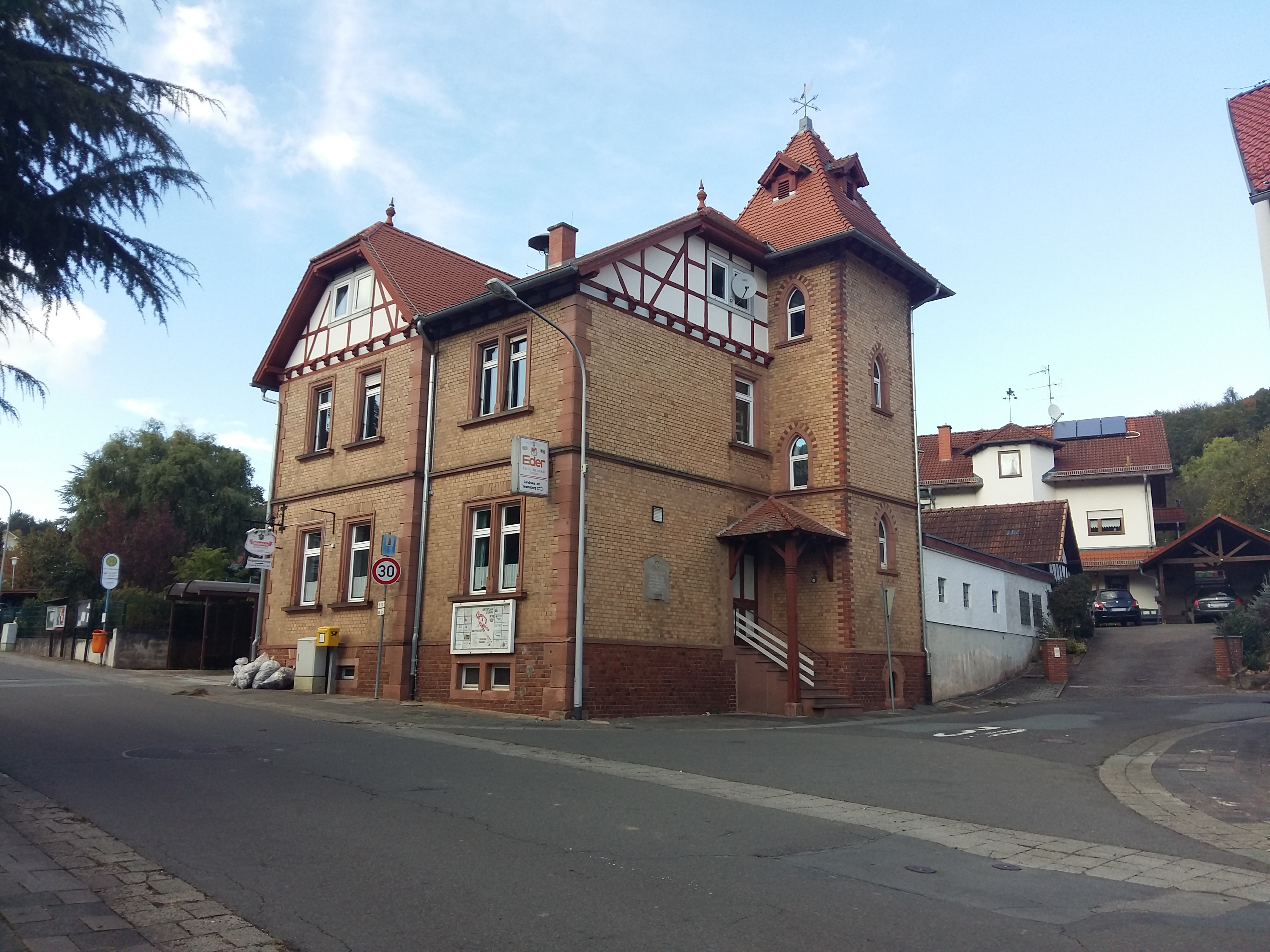 Ehemaliges Rathaus und ehemalige Schule von Ober-Nauses in der Höchster Straße 2 in Otzberg.